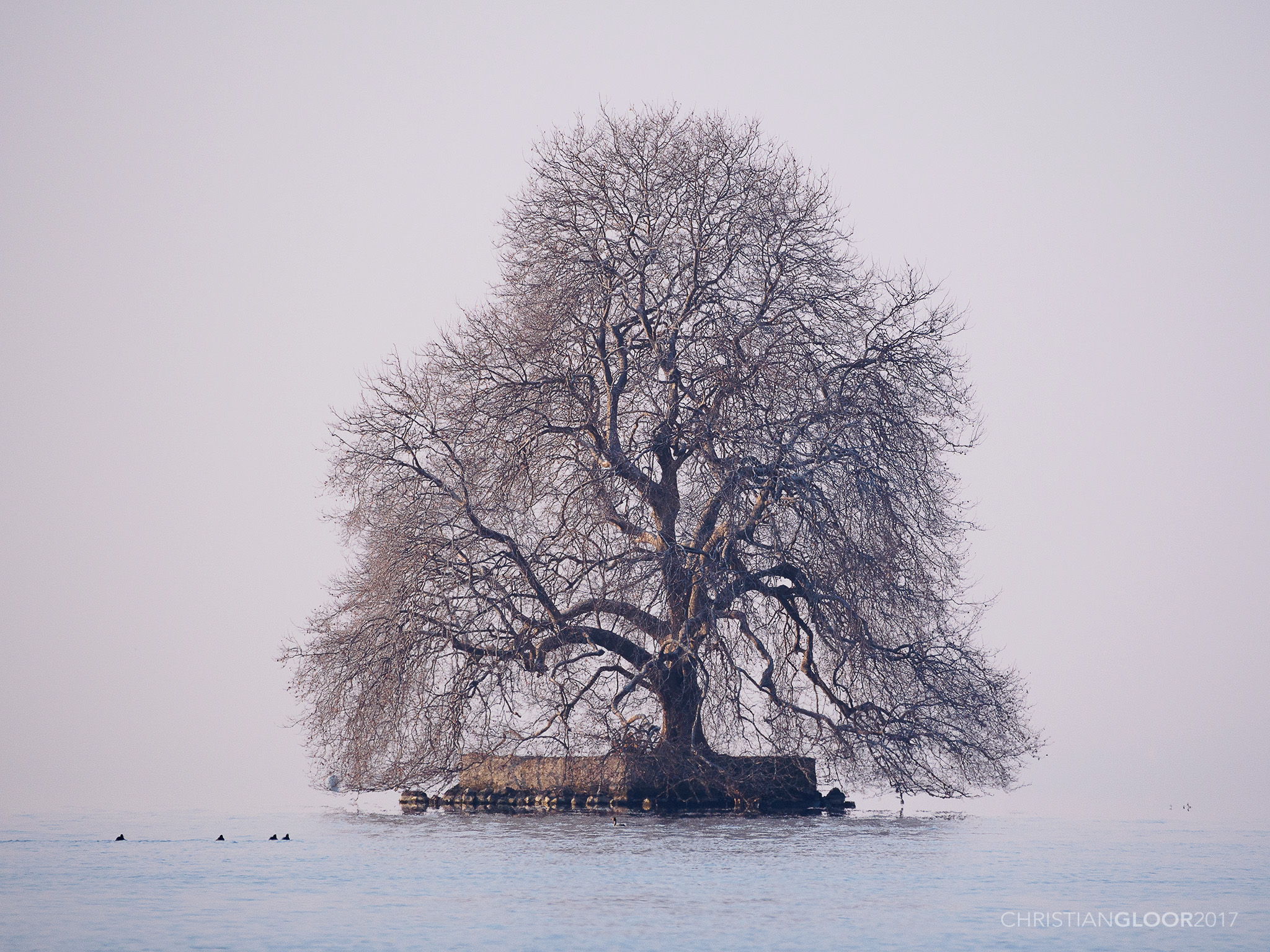 Winterliche Ansicht der Île de Peilz im Genfersee